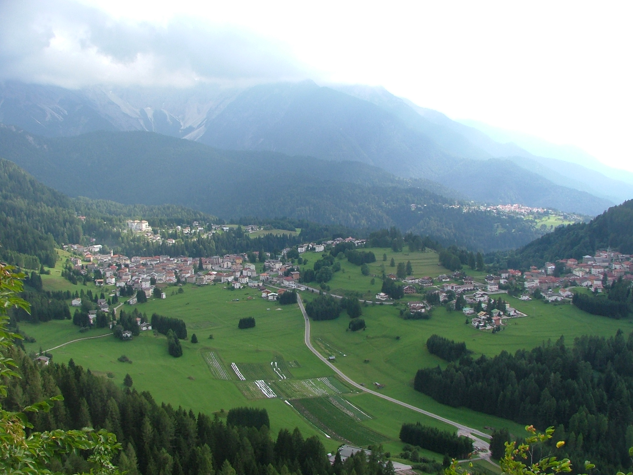 Panorama of Vigo di Cadore (BL), Italy